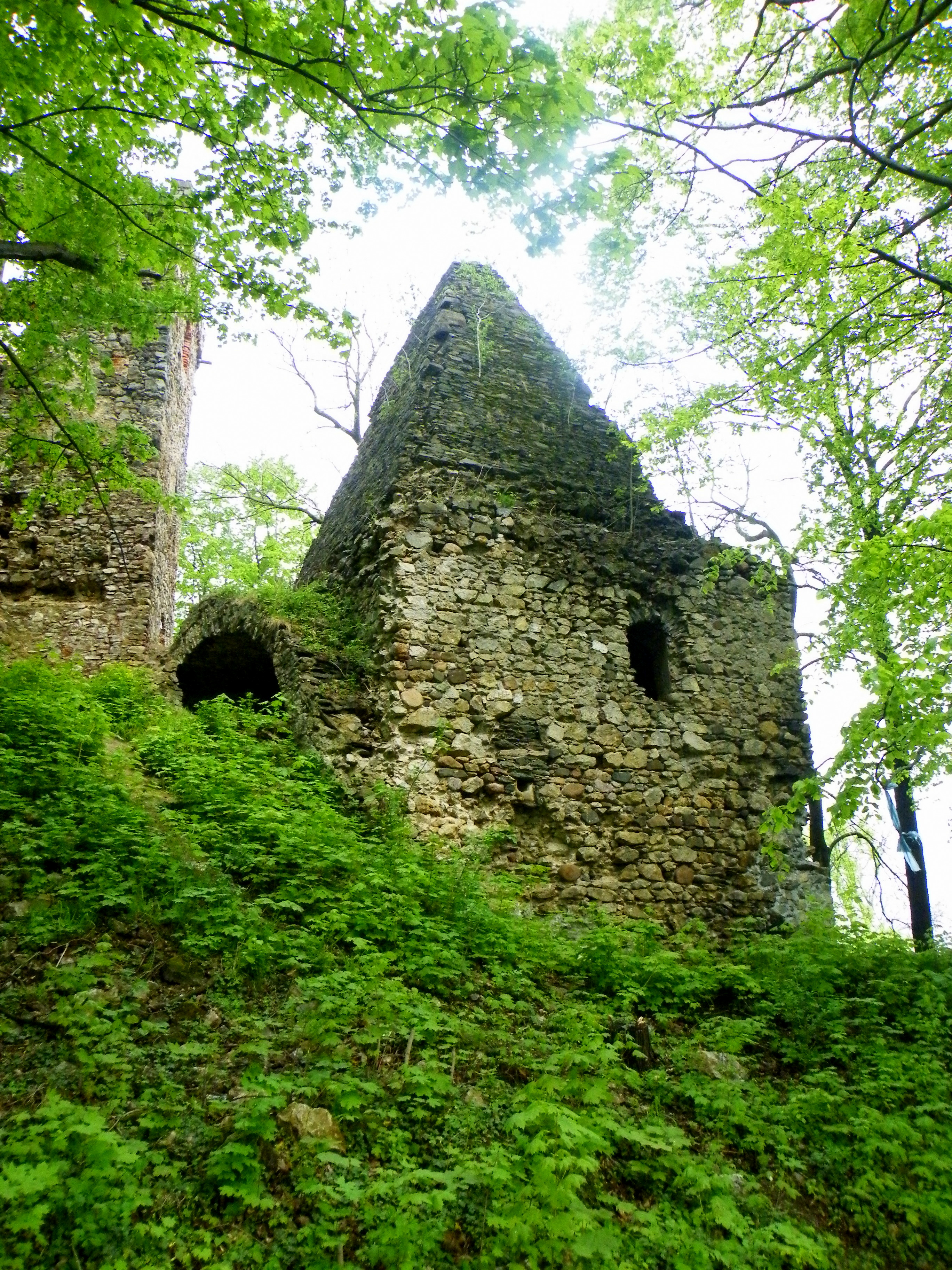 Lipa Górna - zespół zamkowy, XIII-XVII: - ruiny zamku, - budynki przedzamcza, - park, pocz. XX w.